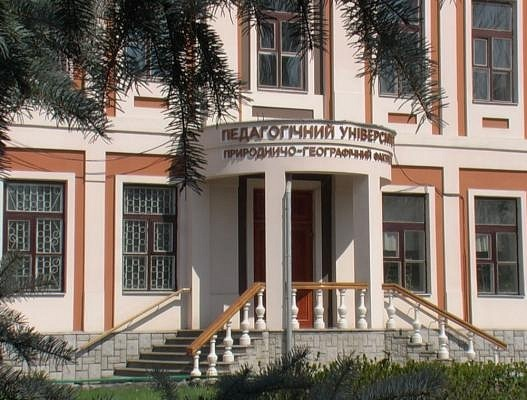 Корпус природничо-географічного факультету Мелітопольського державного педагогічного університету ім. Б. Хмельницького